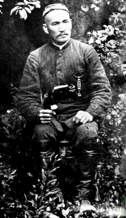 Т. Машрапов